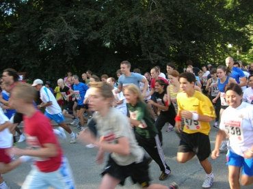 fredsloppet 2006